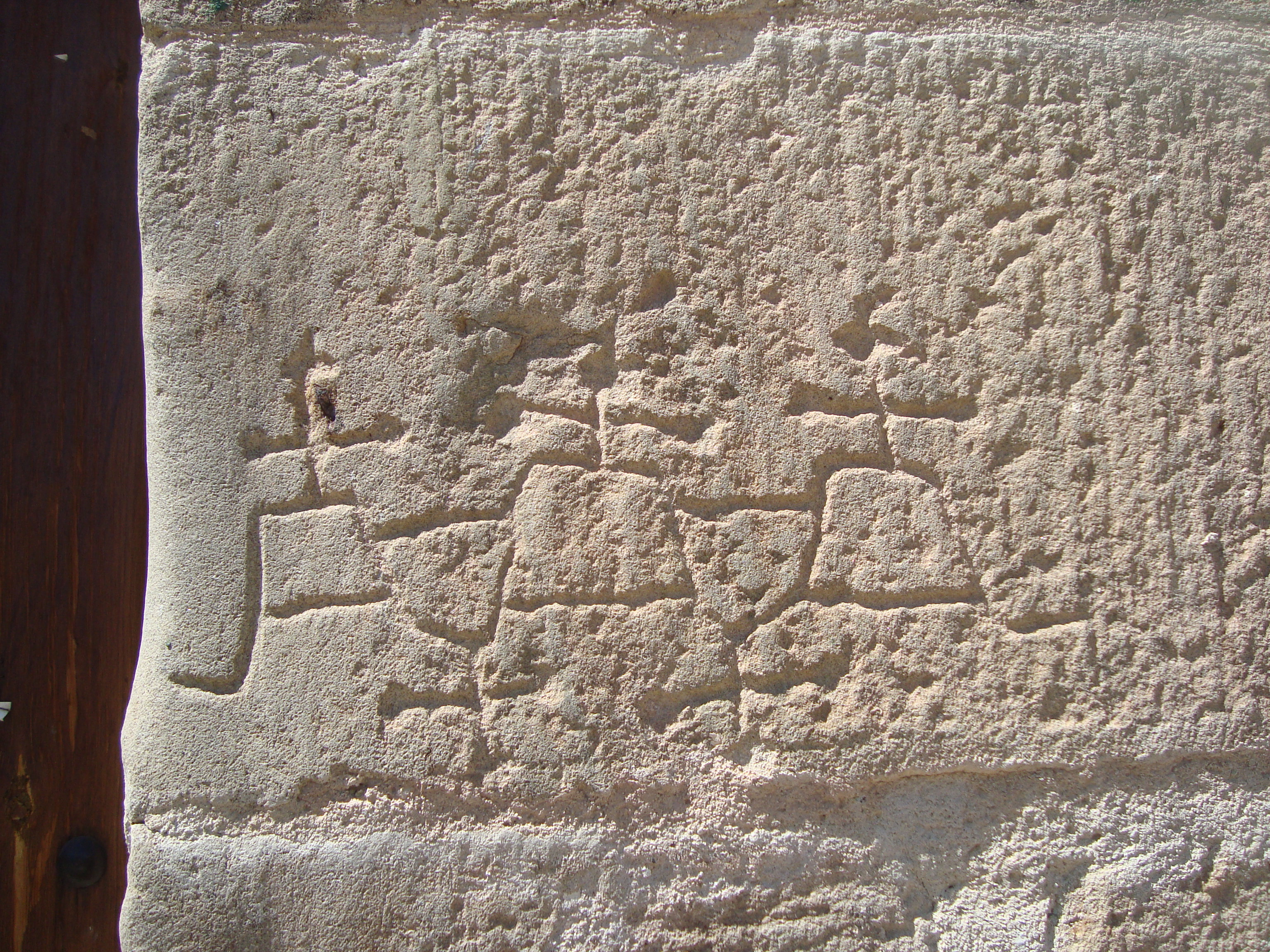 Grabados cruciformes antropomorfos, ermita de San Roque (Olba)